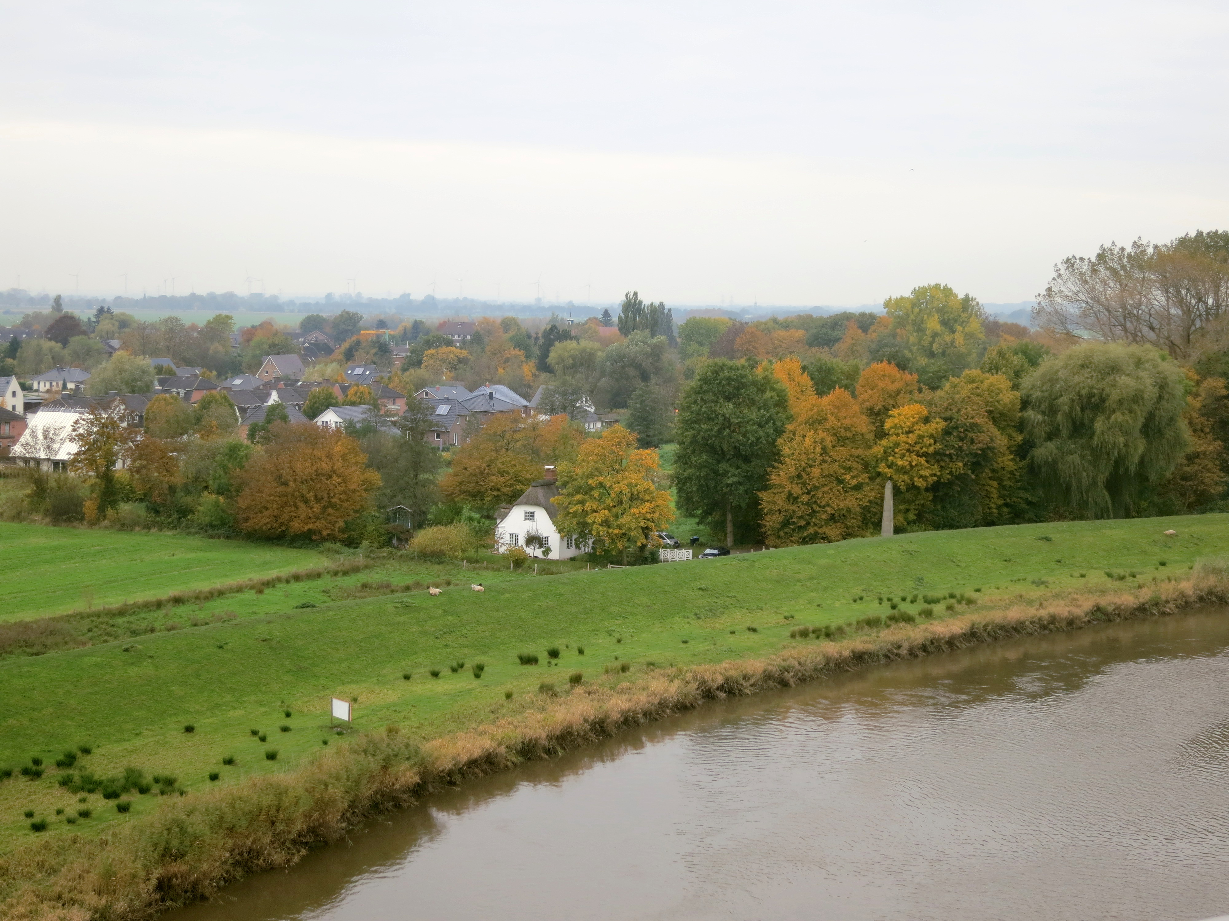 Der unter Denkmalschutz stehende Obelisk am Ende der Schlossstraße in Heiligenstedten; im Vordergrund die Stör